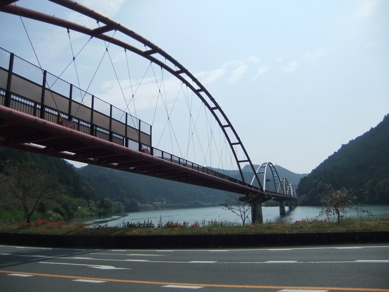 船明ダム 夢のかけ橋 (国鉄佐久間線第2天竜川橋りょう橋脚)